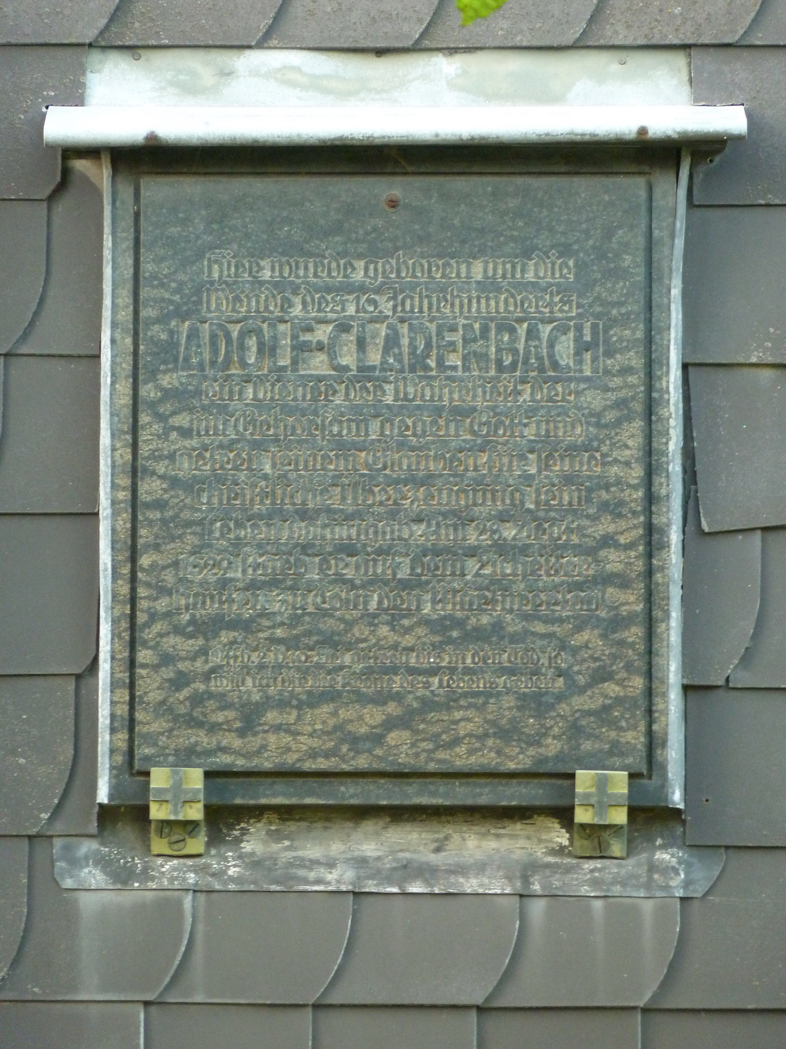 Gedanktafel des Reformators Adolf Buscherhof an seinen Geburtshaus in Bucherhof, Remscheid